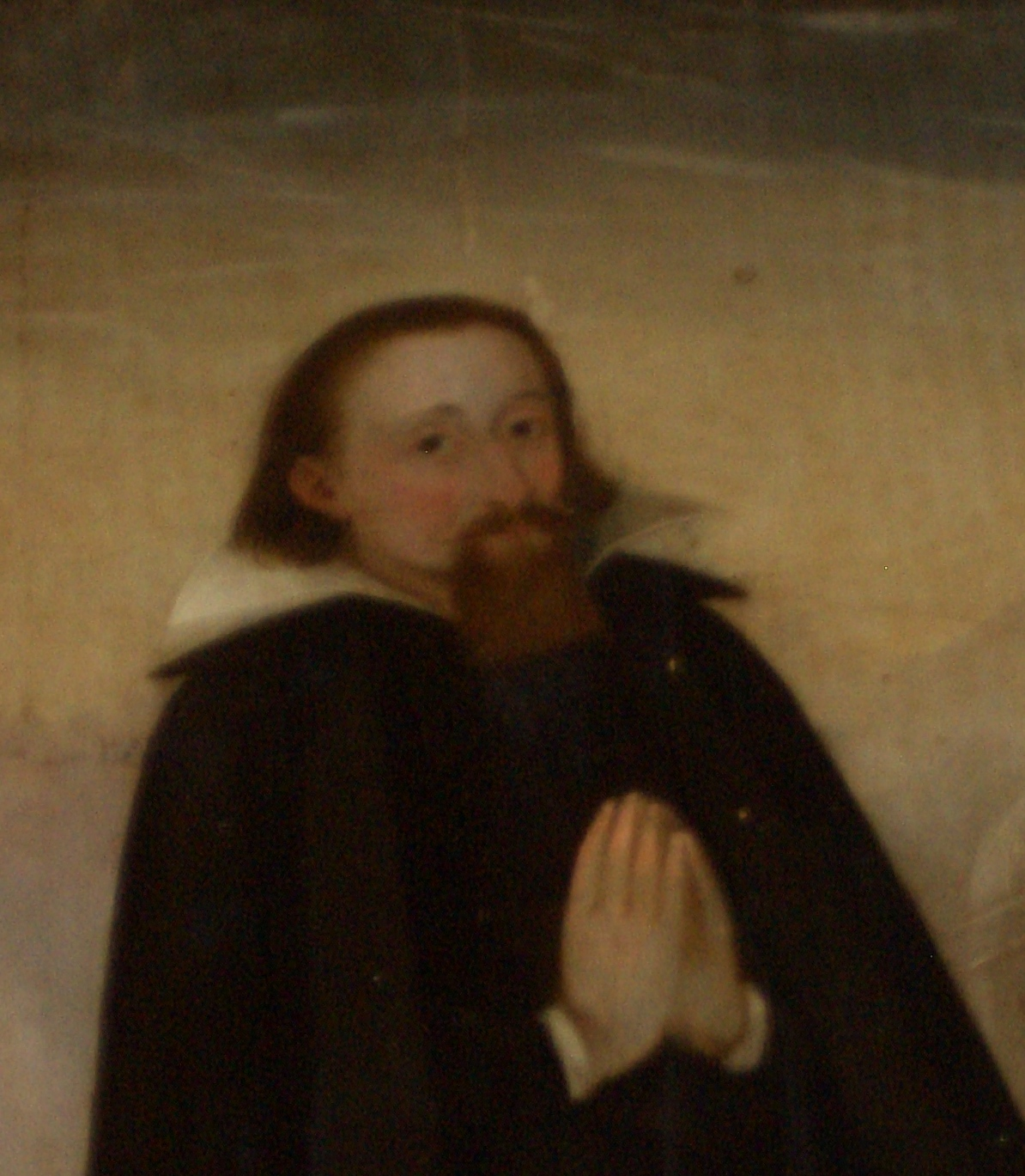 Ausschnitt aus dem Kenotaph für Heinrich Liveherr, Stadtkirche Michelstadt